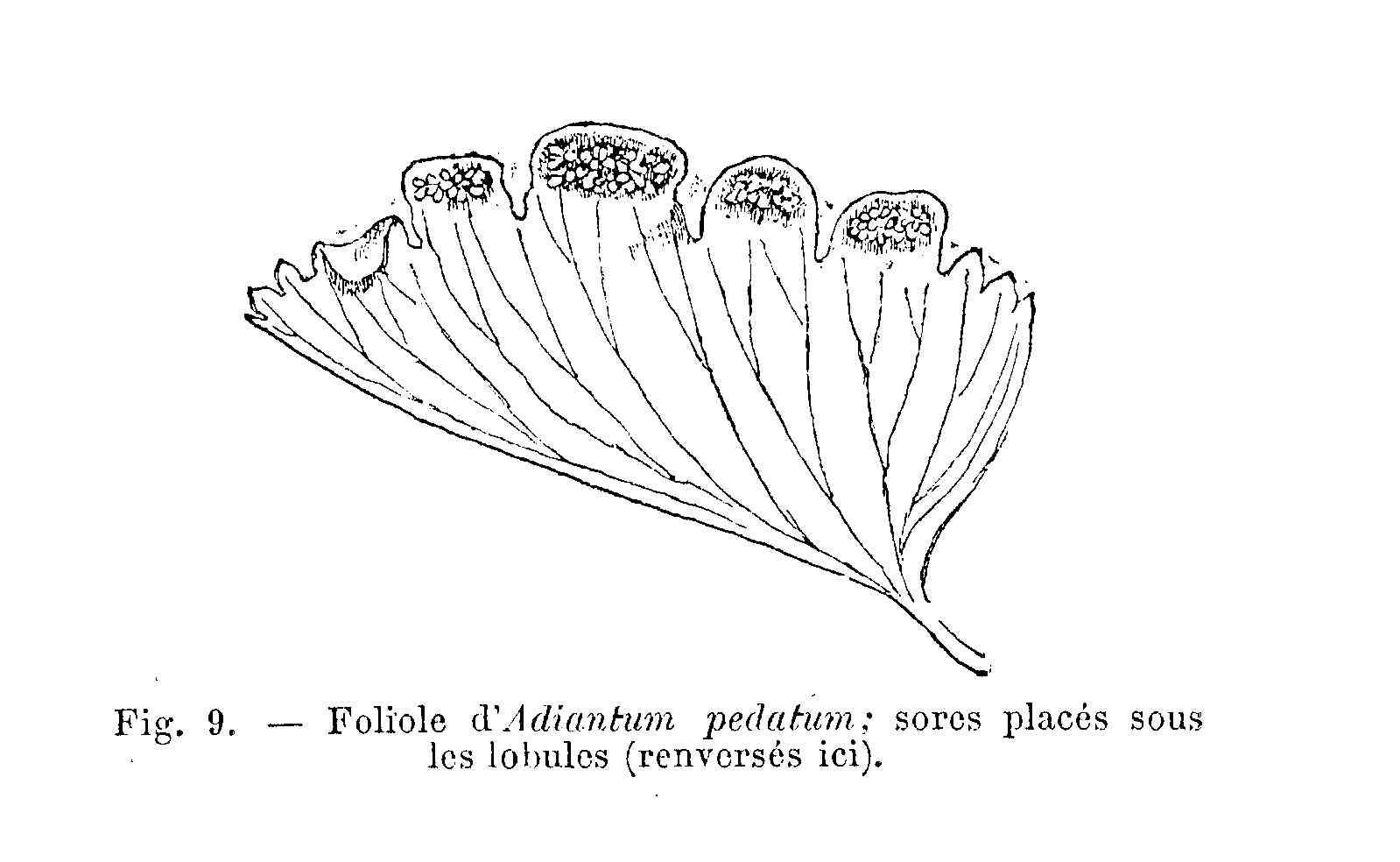 Adiantum pedatum - foliole